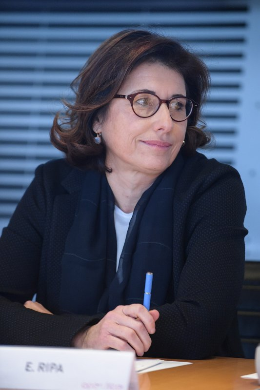 Elisabetta Ripa in conferenza stampa